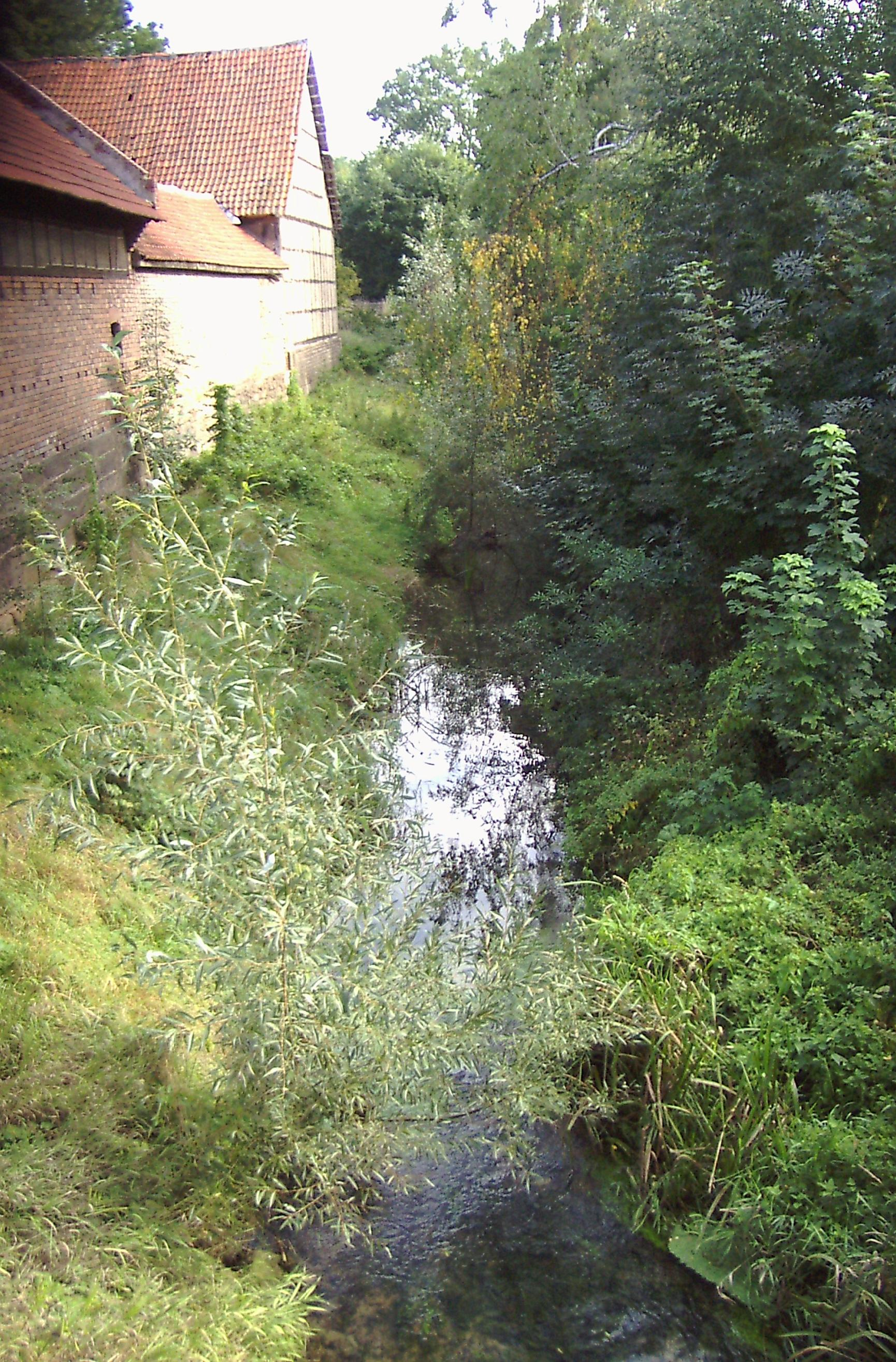 Die Notter in Körner in Fließrichtung von der Straßenbrücke aus fotografiert.